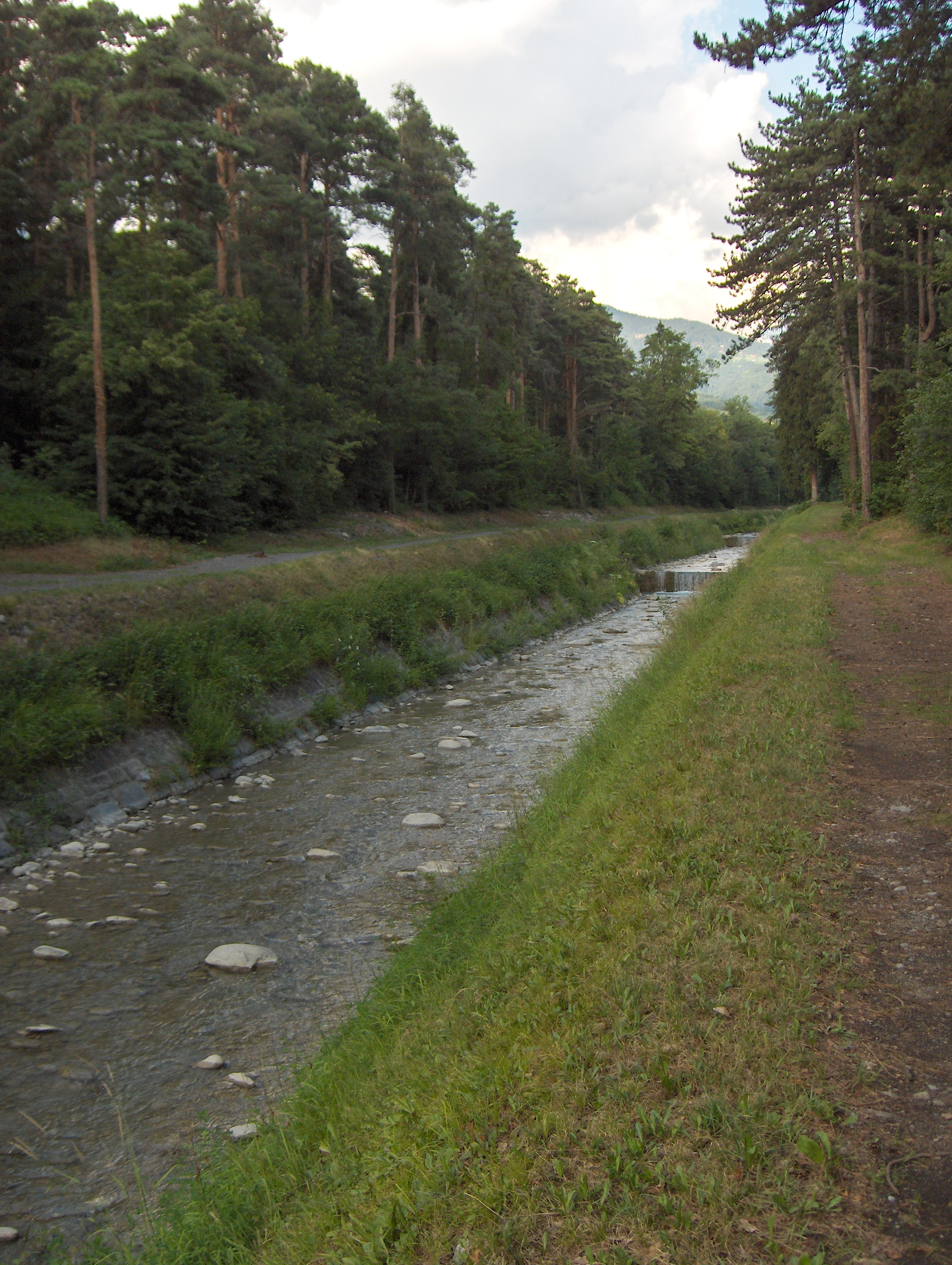 Gryonne, river in Switzerlabnd